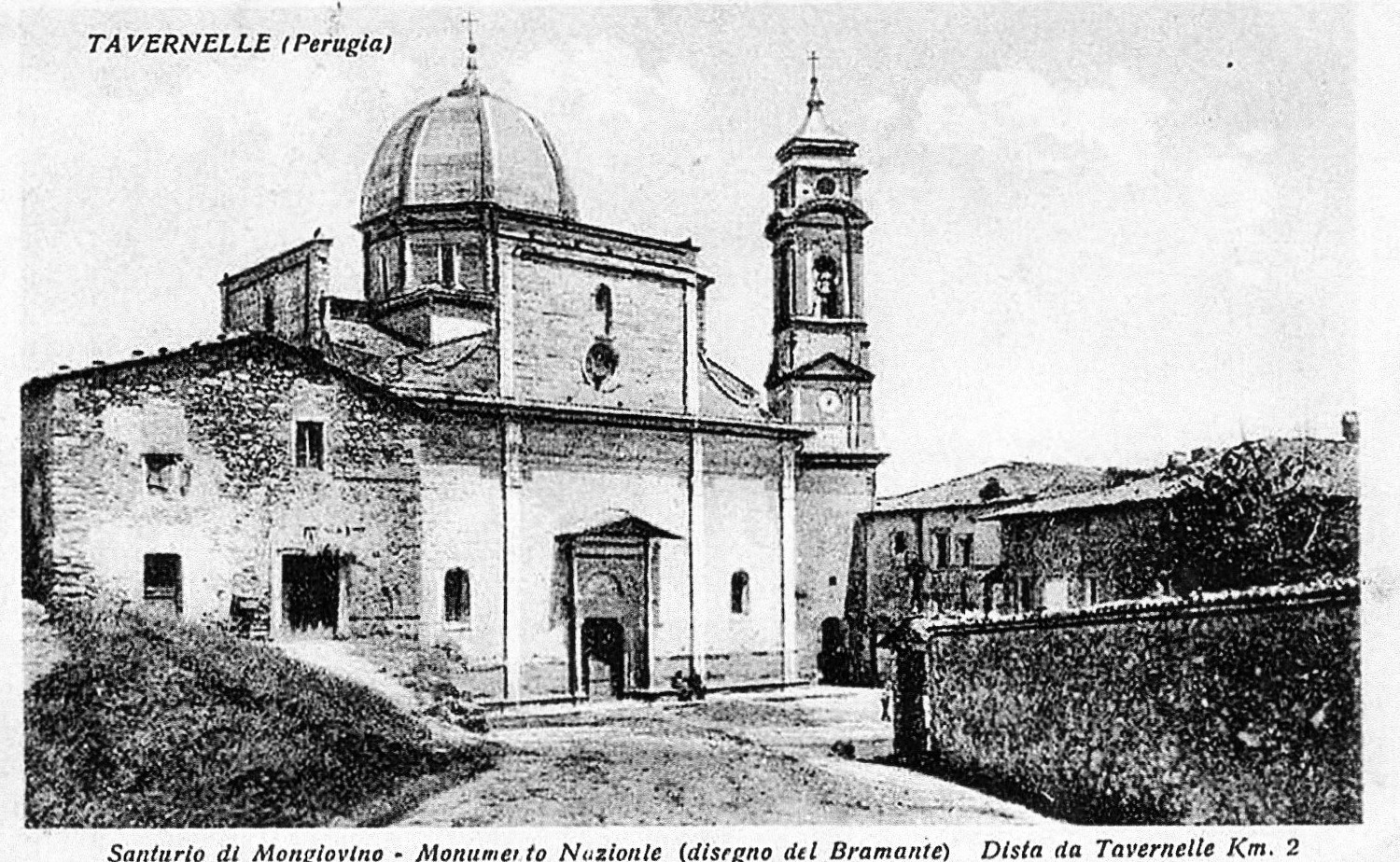 il Santuario della Madonna di Mongiovino (provincia di Perugia)